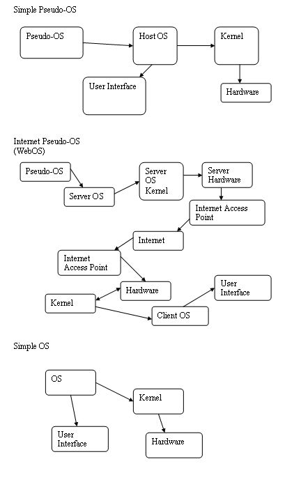 Esquema do Pseudo-OS e OS comum